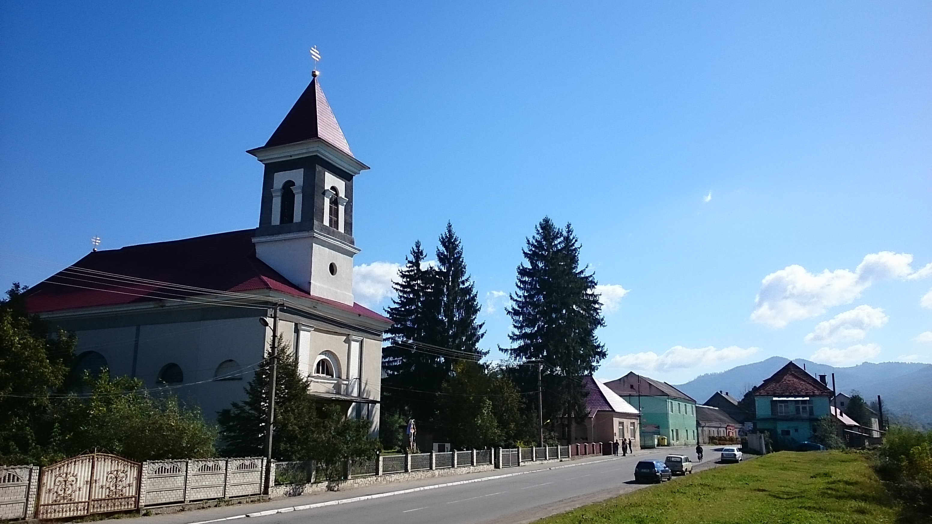 Церковь и улица, Великий Бычков, Закарпатье